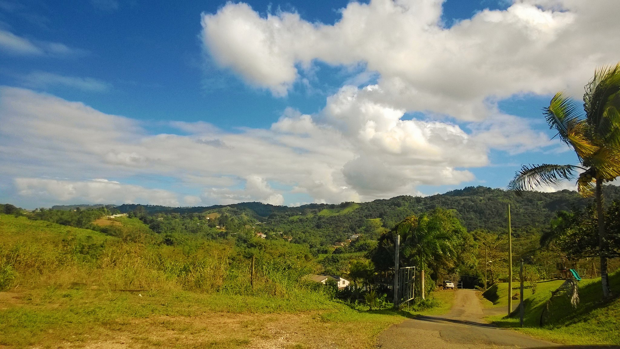 Barrio Padilla, Corozal, Puerto Rico (2014)